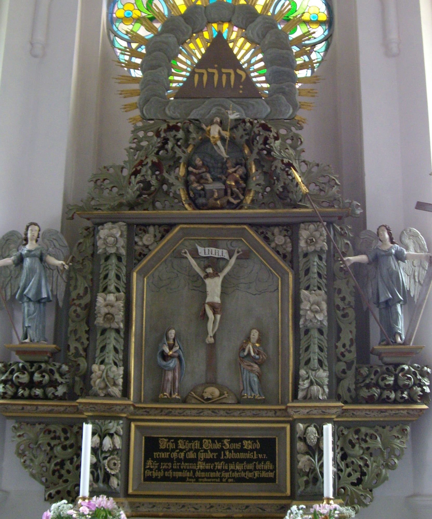 Altarkrön med tetragrammet JHWH i Hishults kyrka